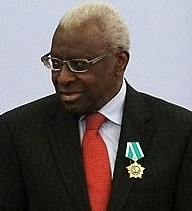 Дмитрий Медведев вручил орден Дружбы президенту Международной ассоциации легкоатлетических федераций Ламину Диаку